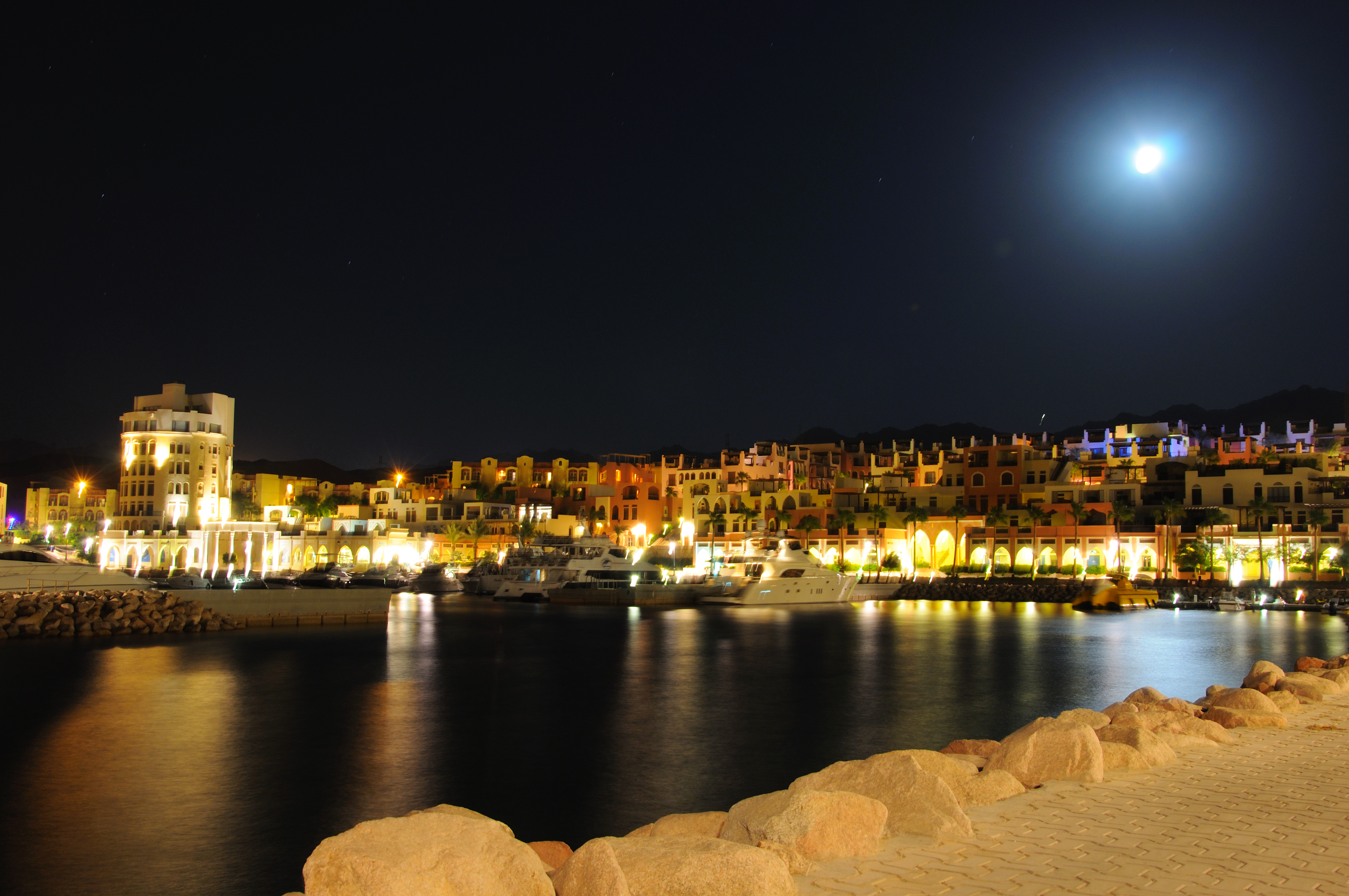 Tala Bay Marina by Night